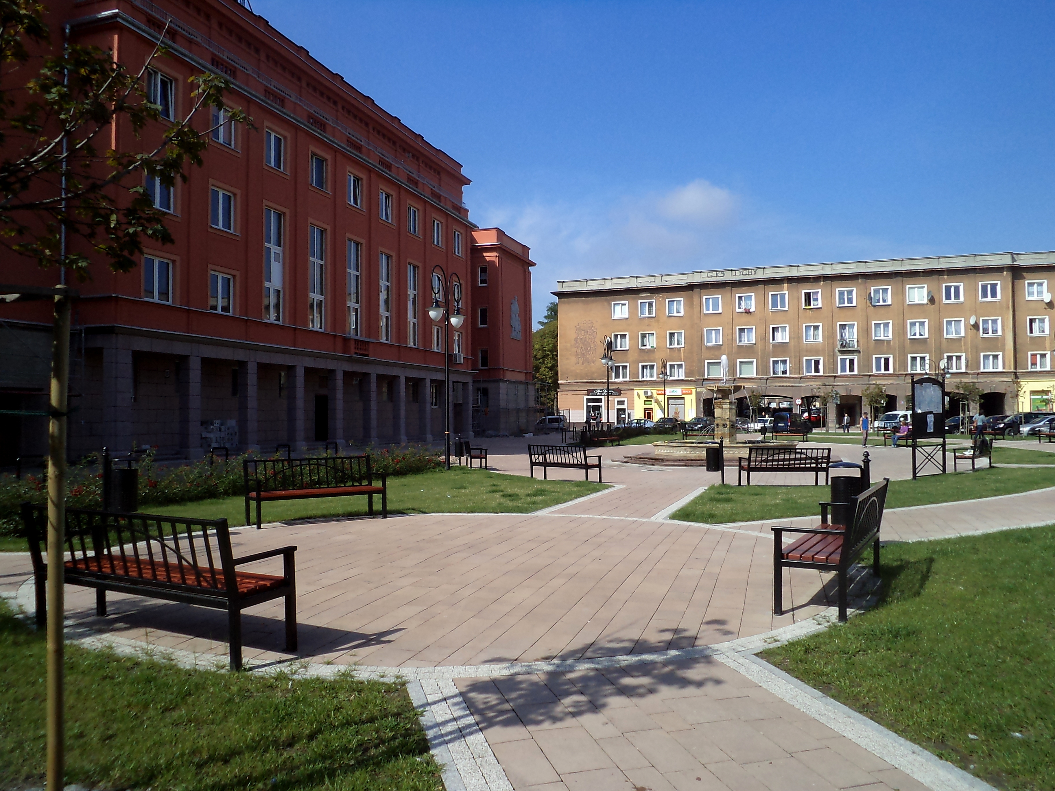 Osiedle A (zwane też Osiedlem Anna) – tyskie osiedle położone w dzielnicy Śródmieście, zrealizowane w latach 1951–1956.